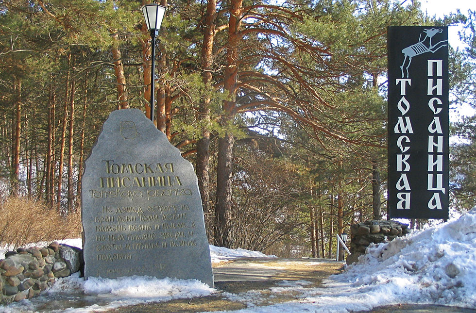 Museum Tomskaya Pisanitsa on Tom river, Siberia. RU: Музей-заповедник Томская писаница на реке Томь